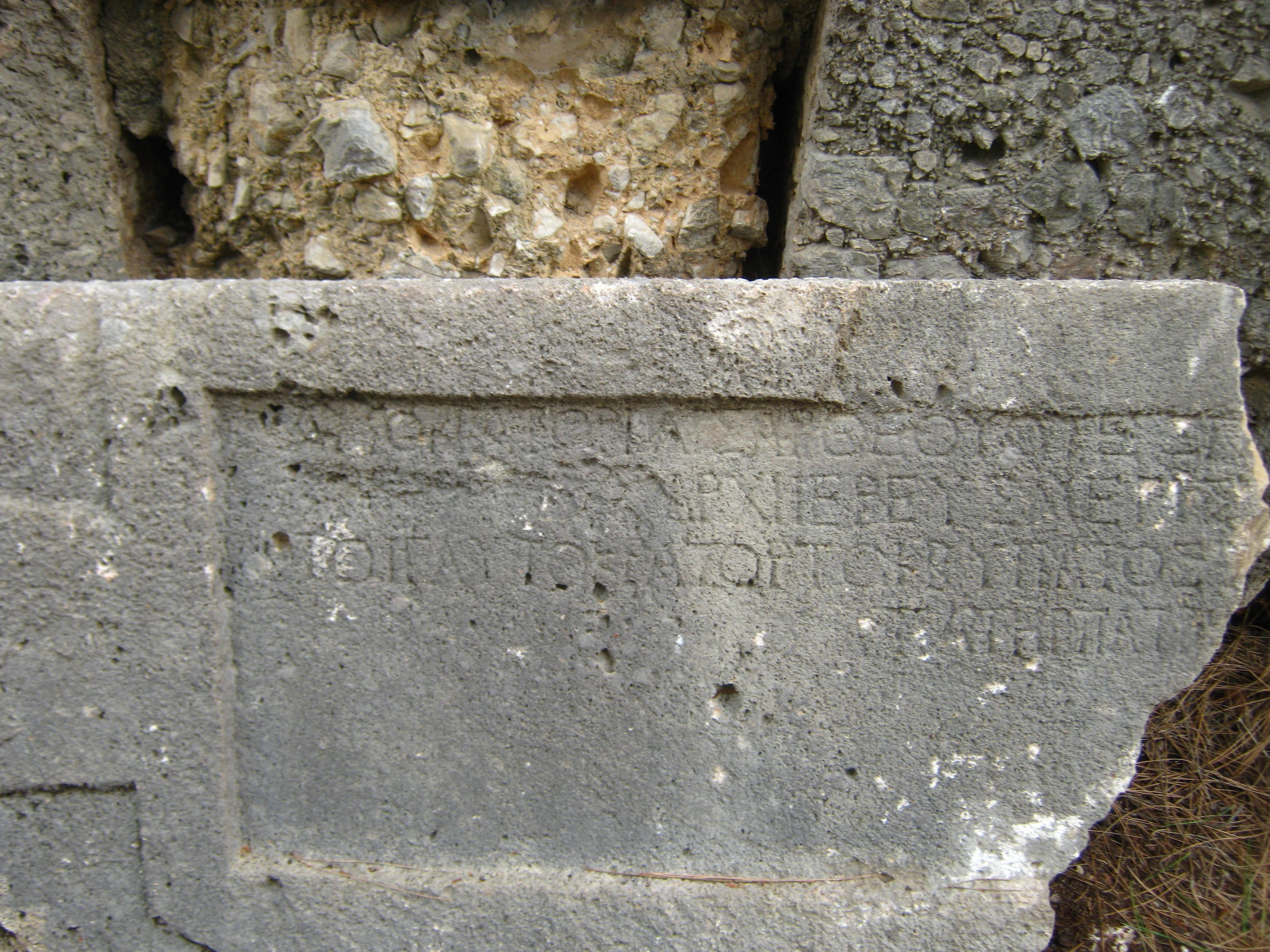 Фаселіс. Напис на честь імператора Веспасіана